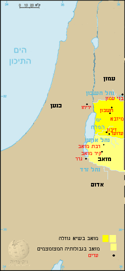 Mapa de Moab segon la Bíblia.